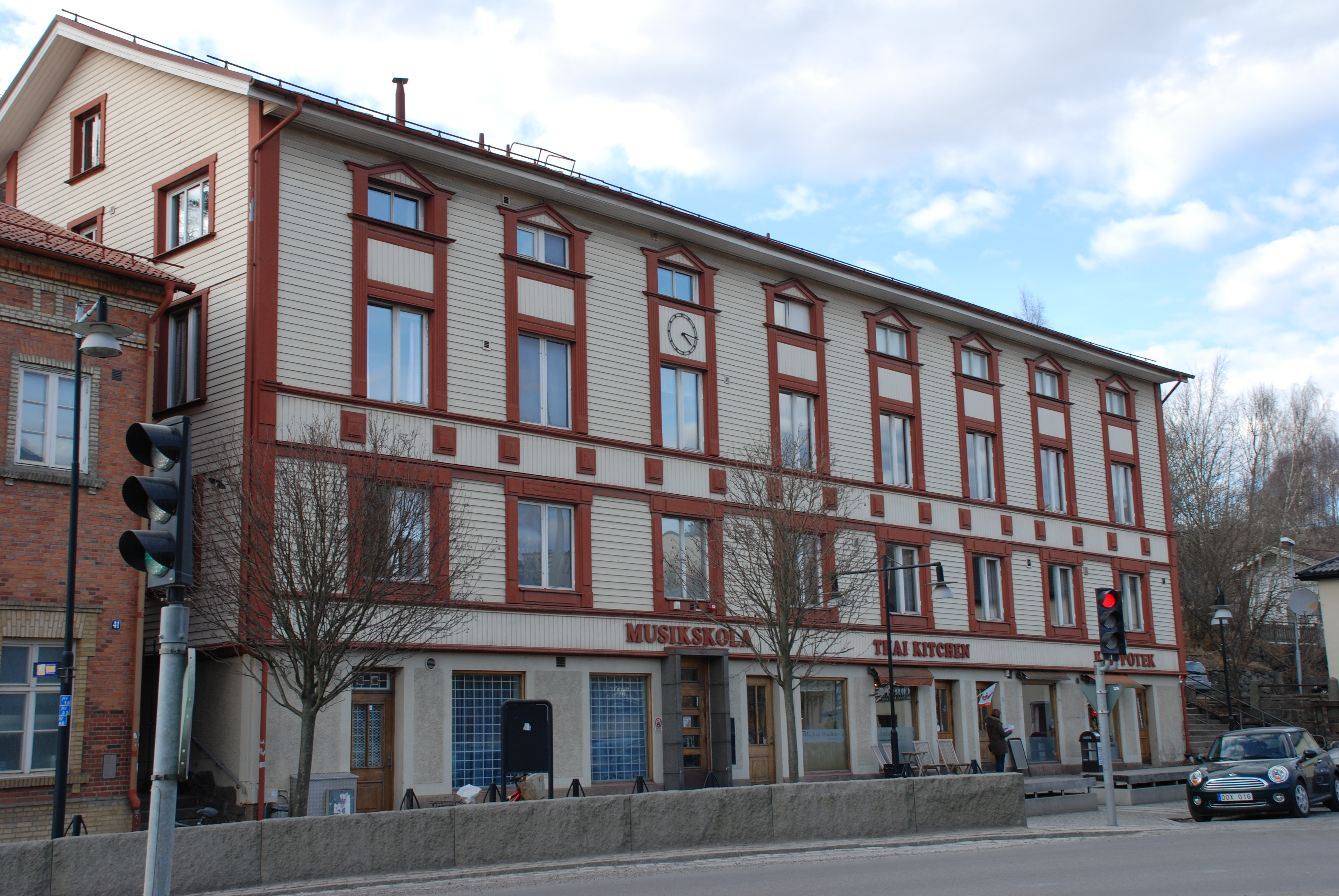 Gamla stadshuset (Musikskolan), Kvarnbygatan 43 i Mölndal.